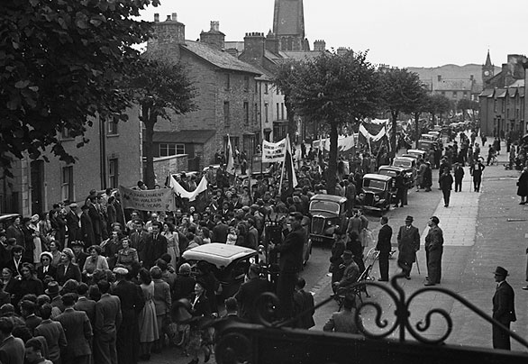 Teitl Cymraeg/Welsh title: Rali Plaid Cymru ym Machynlleth ym 1949 yn rhoi cychwyn i'r ymgyrch "Senedd i Gymru mewn 5 mlynedd" Ffotograffydd/Photographer: Geoff Charles (1909-2002) Dyddiad/Date: 17/10/1949 Cyfrwng/Medium: Negydd ffilm / Film negative Cyfeiriad/Reference: (gcc08473) Rhif cofnod / Record no.: 3473068 Rhagor o wybodaeth am gasgliad Geoff Charles yn Llyfrgell Genedlaethol Cymru More information about the Geoff Charles Collection at the National Library of Wales Mae ffotograffau Geoff Charles hefyd yn rhan o Broject Europeana Libraries Geoff Charles' photographs also form part of the Europeana Libraries Project